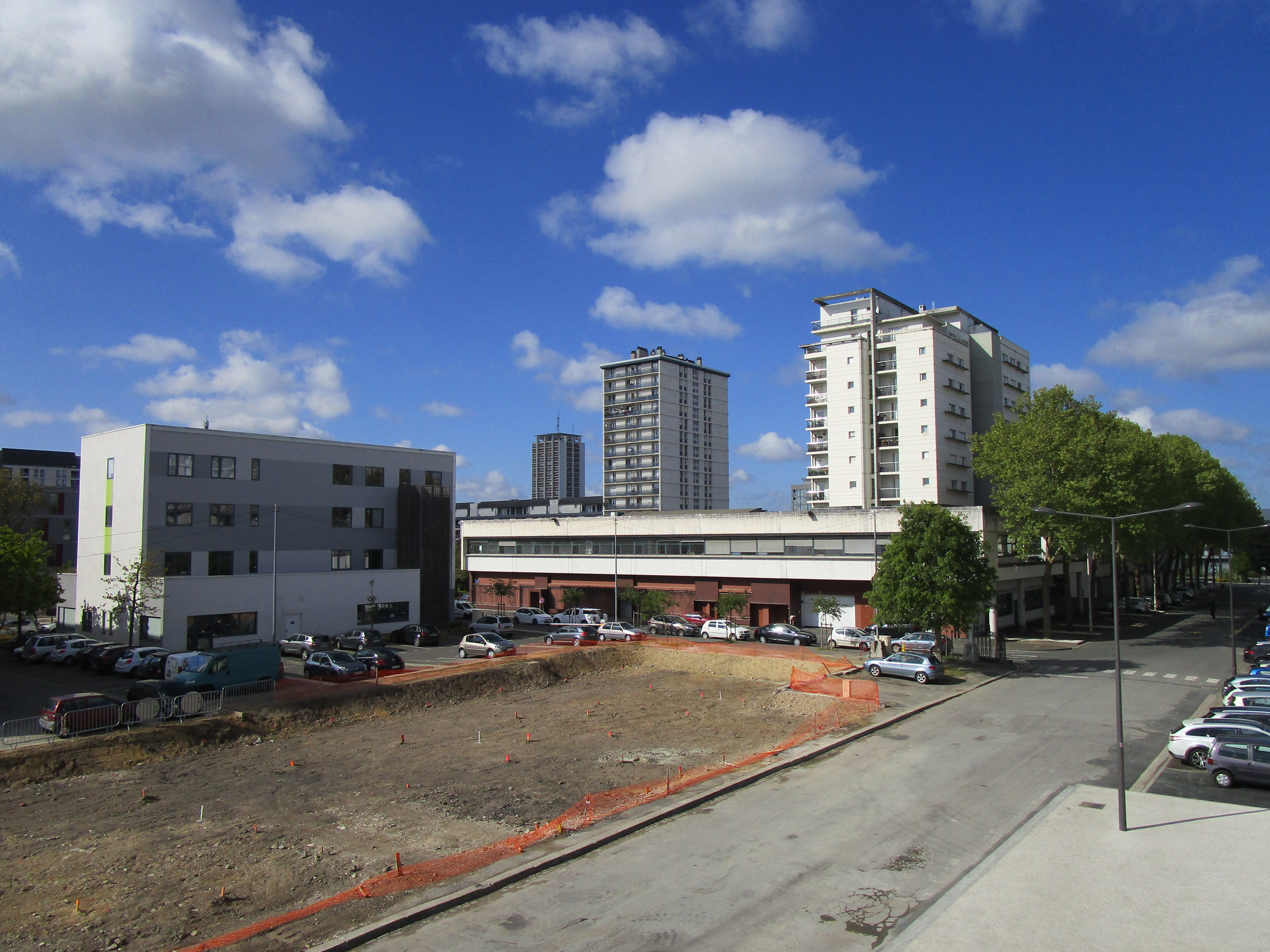 Le quartier Sanitas vue depuis la passerelle Fournier. A gauche, la pépinière d'entreprise et au premier plan, l'emplacement de l'ancienne chaufferie.